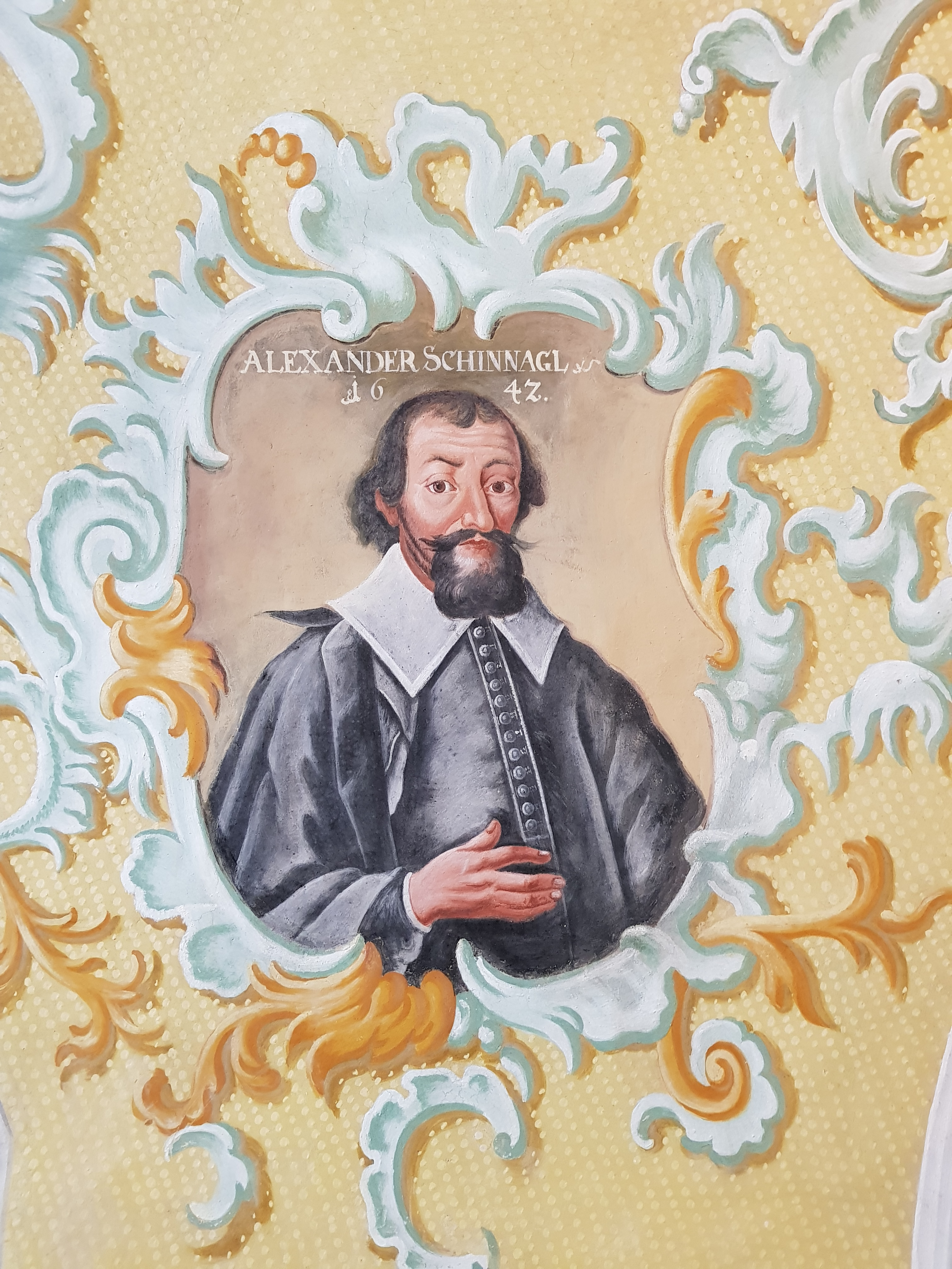 Fresko mit dem Bildnis von Alexander Schinnagel in der Schatzkammer der Wallfahrtskirche Maria Taferl